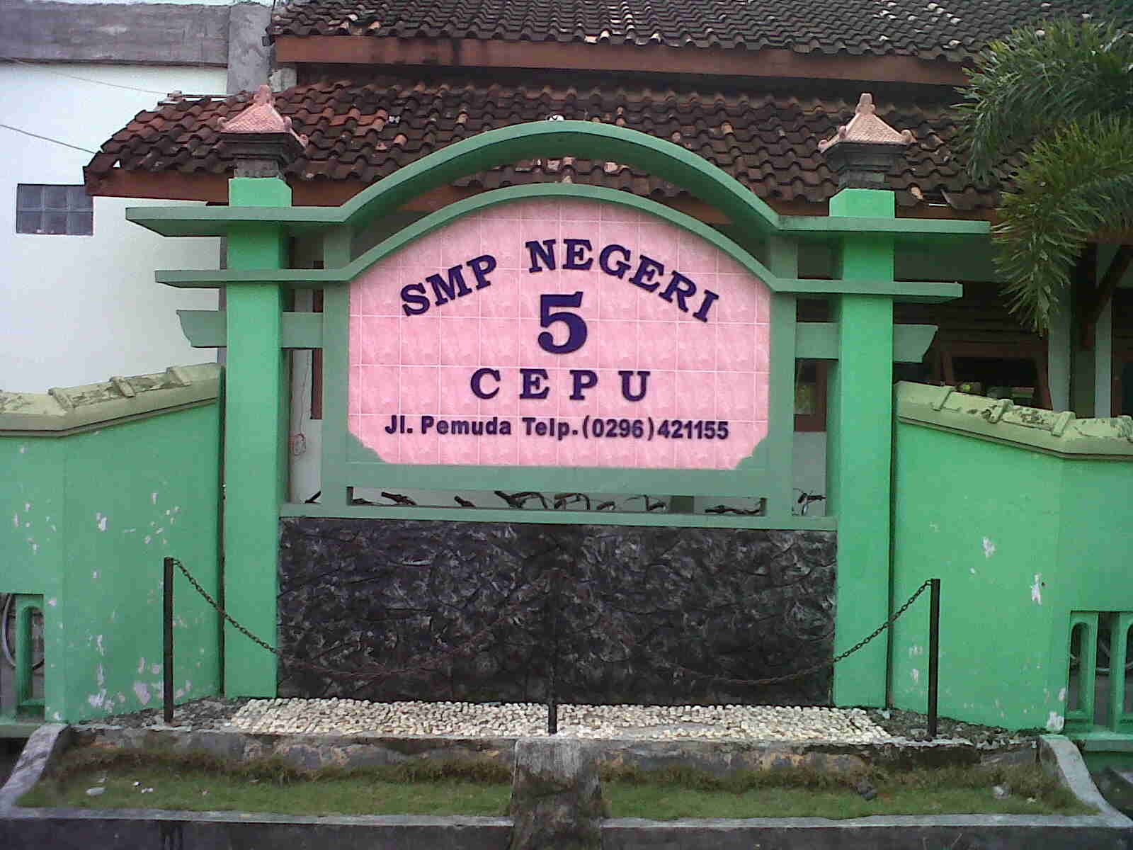 SMP N 5 Cepu Blora Jawa Tengah Indonesia